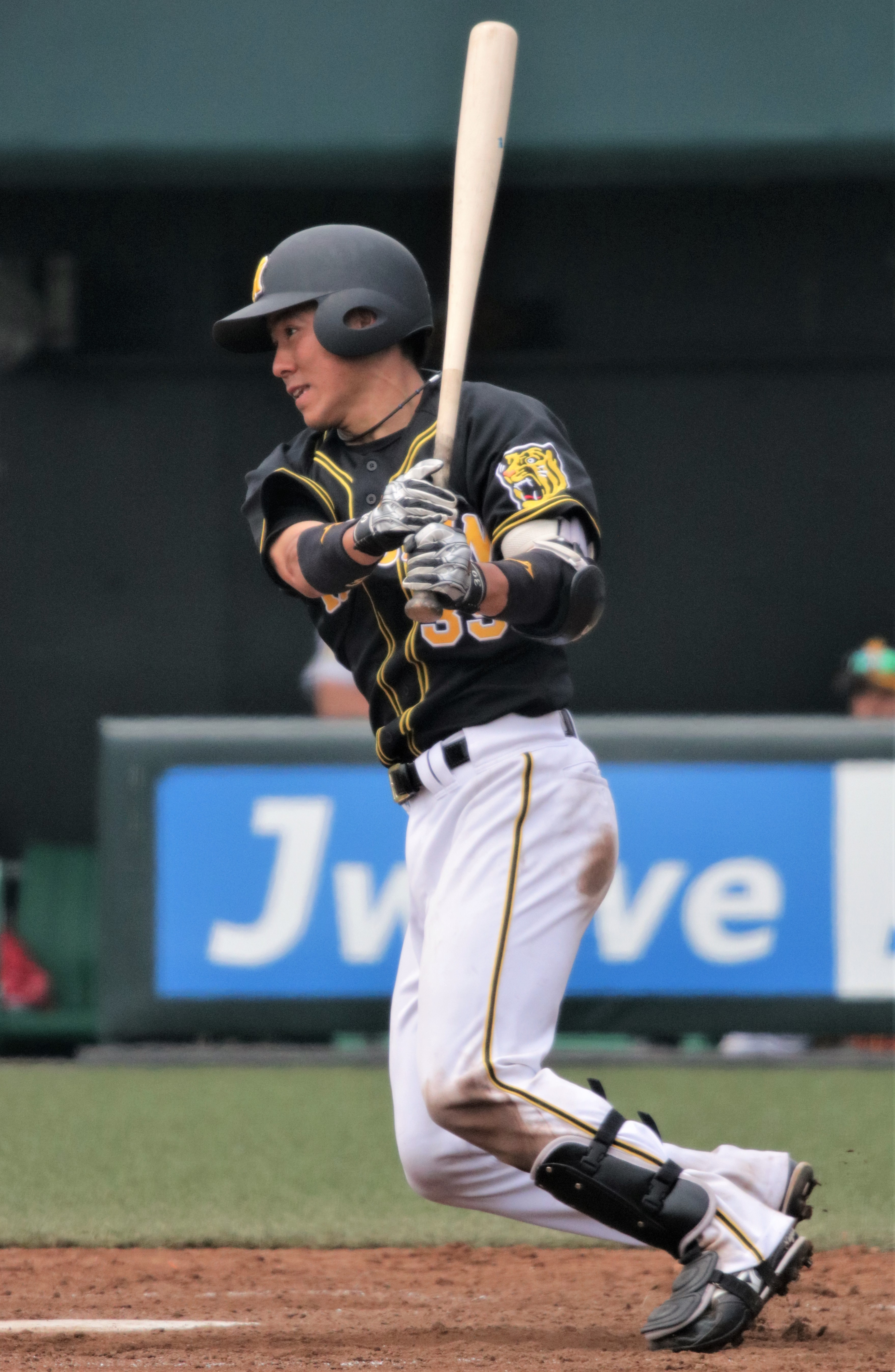 2018/5/1 タマホームスタジアム筑後